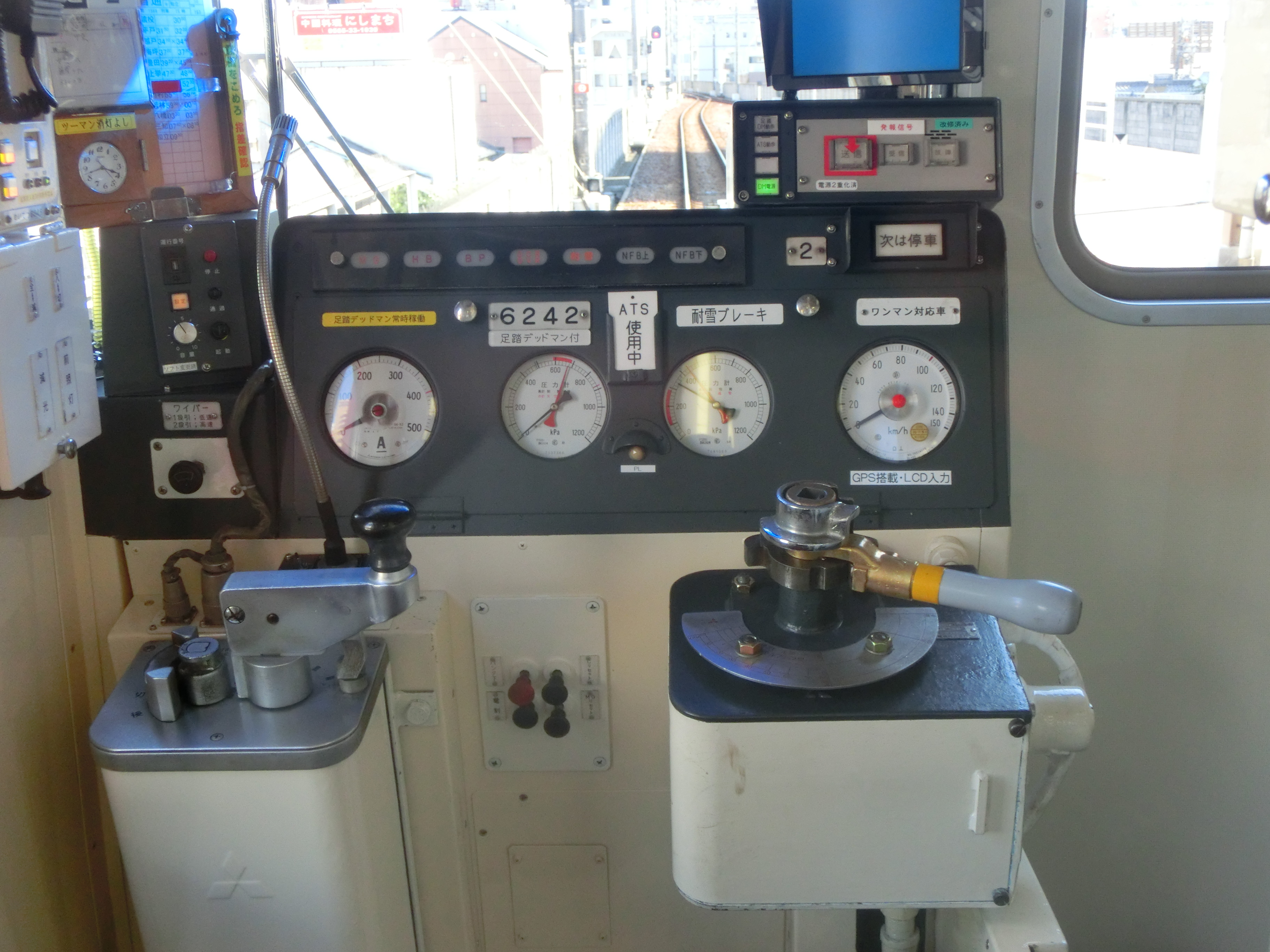 海線区間では運転台上部にある小型液晶モニターを使用している。